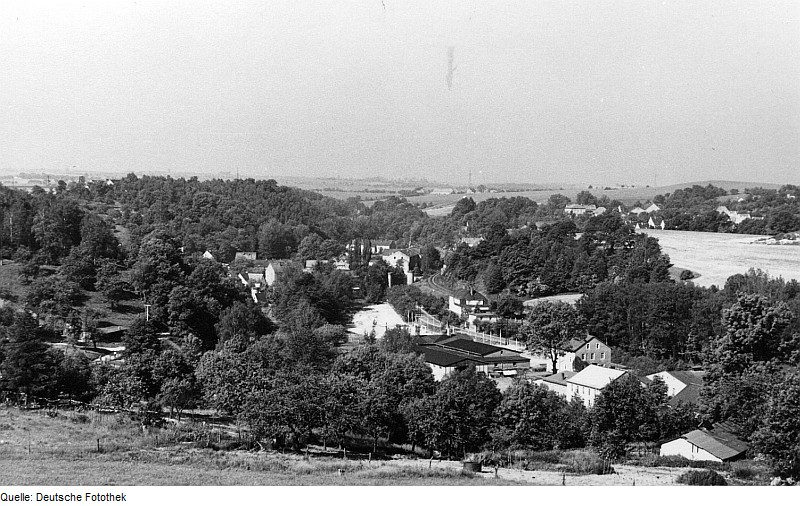 Original image description from the Deutsche FotothekTriebischtal-Robschütz. Blick ins Triebischtal auf das Talkumwerk, ehem. Papierfabrik (seit 1932 Talkumfabrik, 1993 geschlossen)